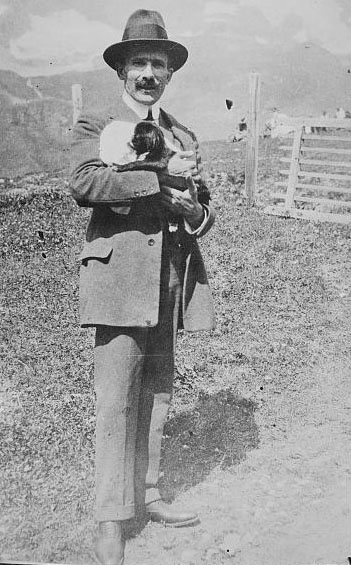 Arturo Toscanini (1867 – 1957), Italian musician, conductor